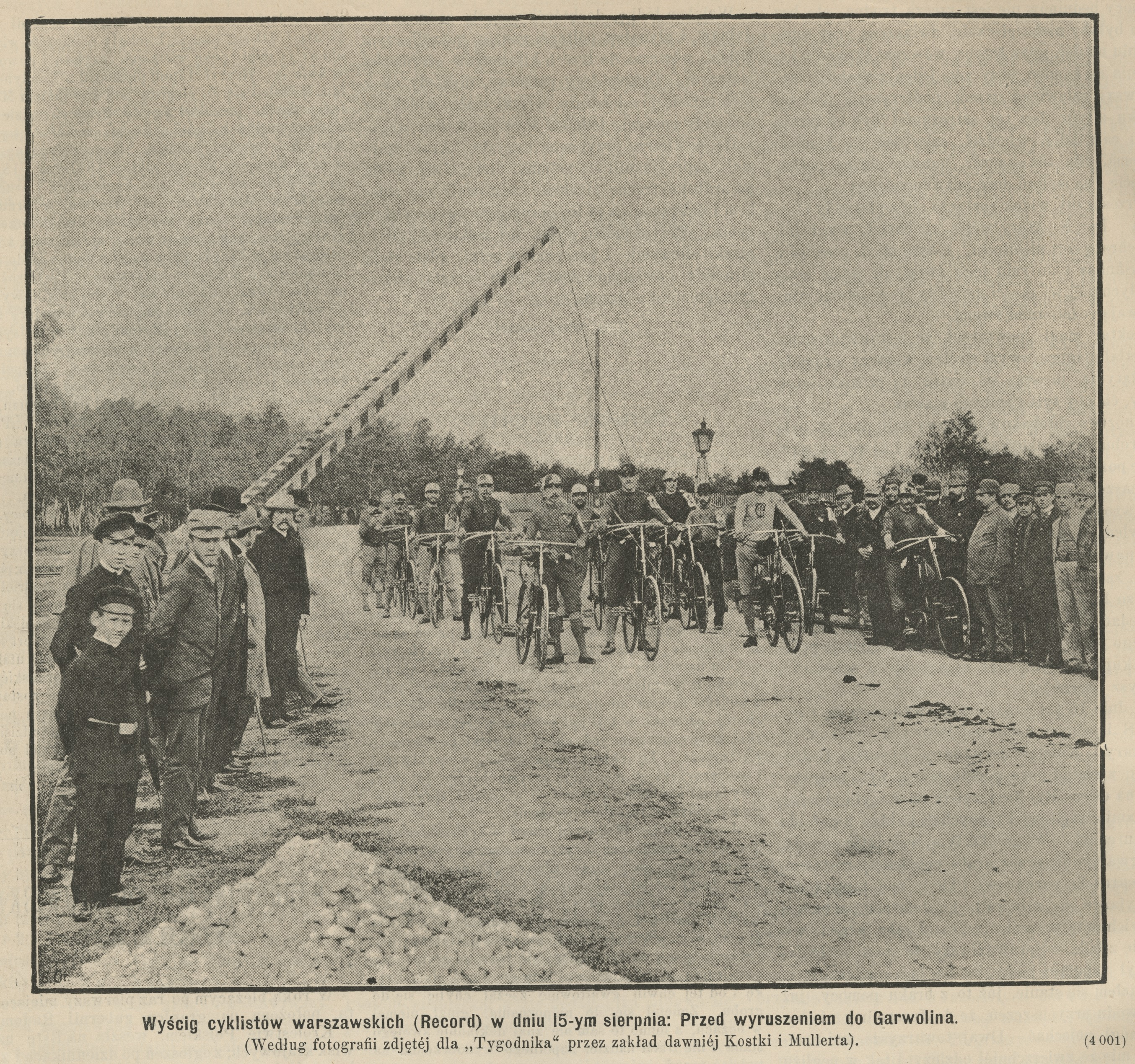 Wyścig cyklistów warszawskich (Record) w dn. 15 sierpnia : Przed wyruszeniem do Garwolina